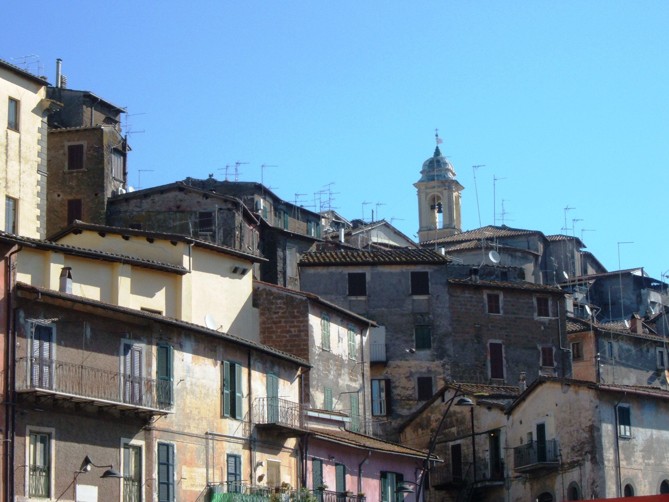 Panorama di Vignanello